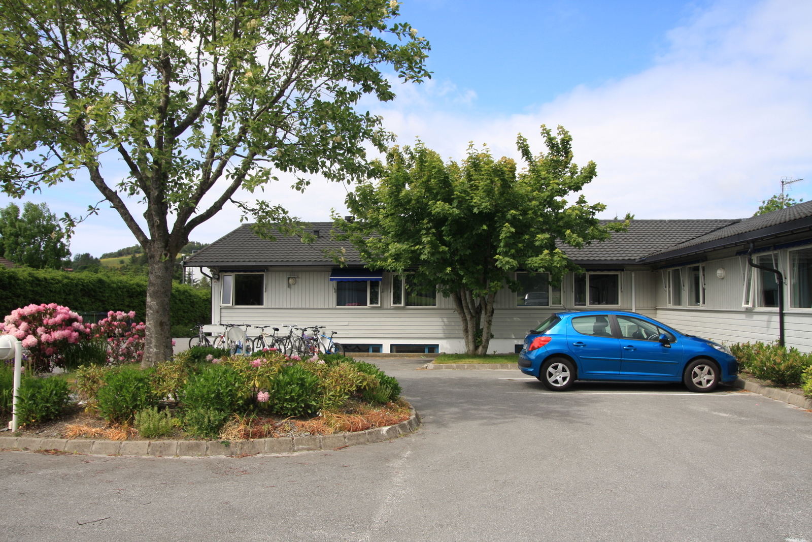 Auklend overgangsbolig